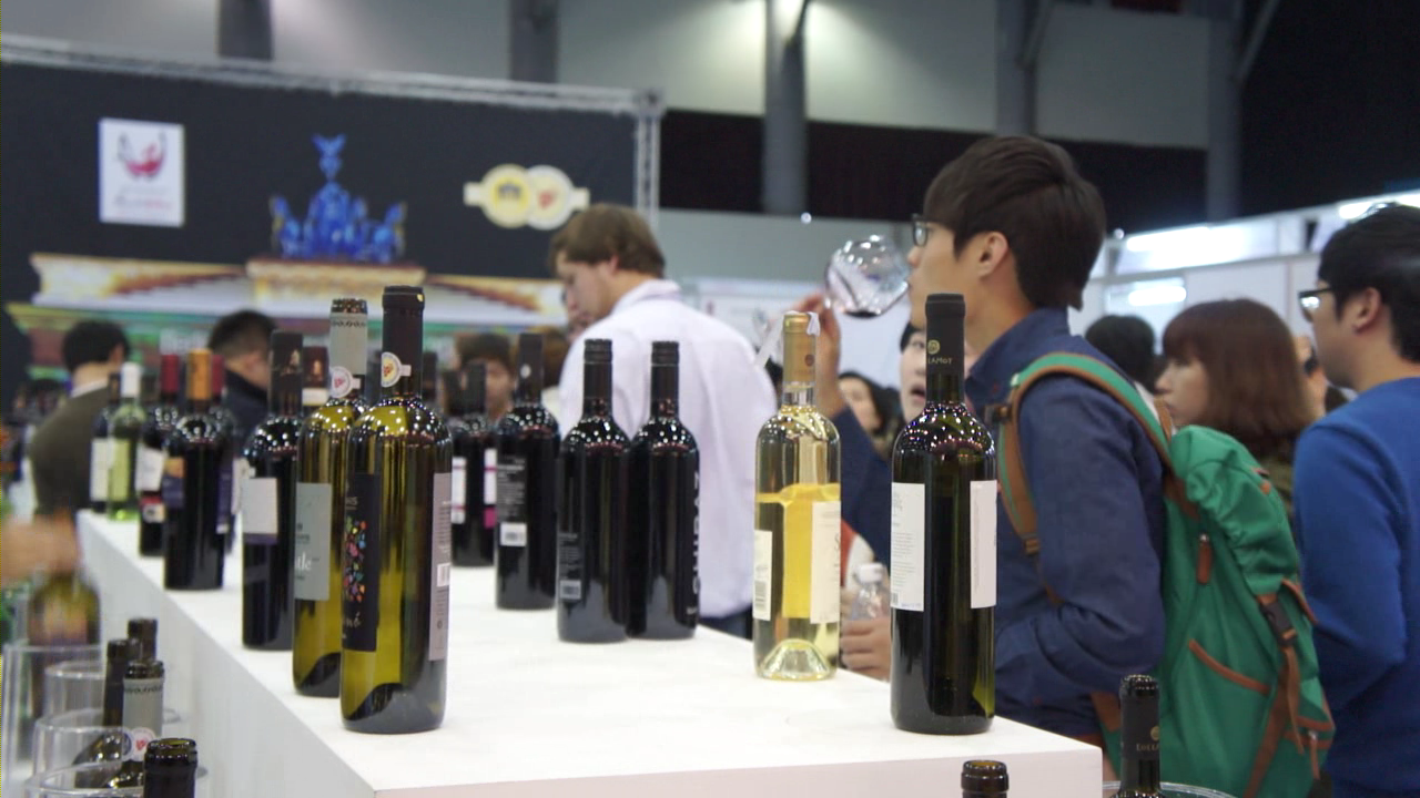 대전 국제푸드&와인페스티벌